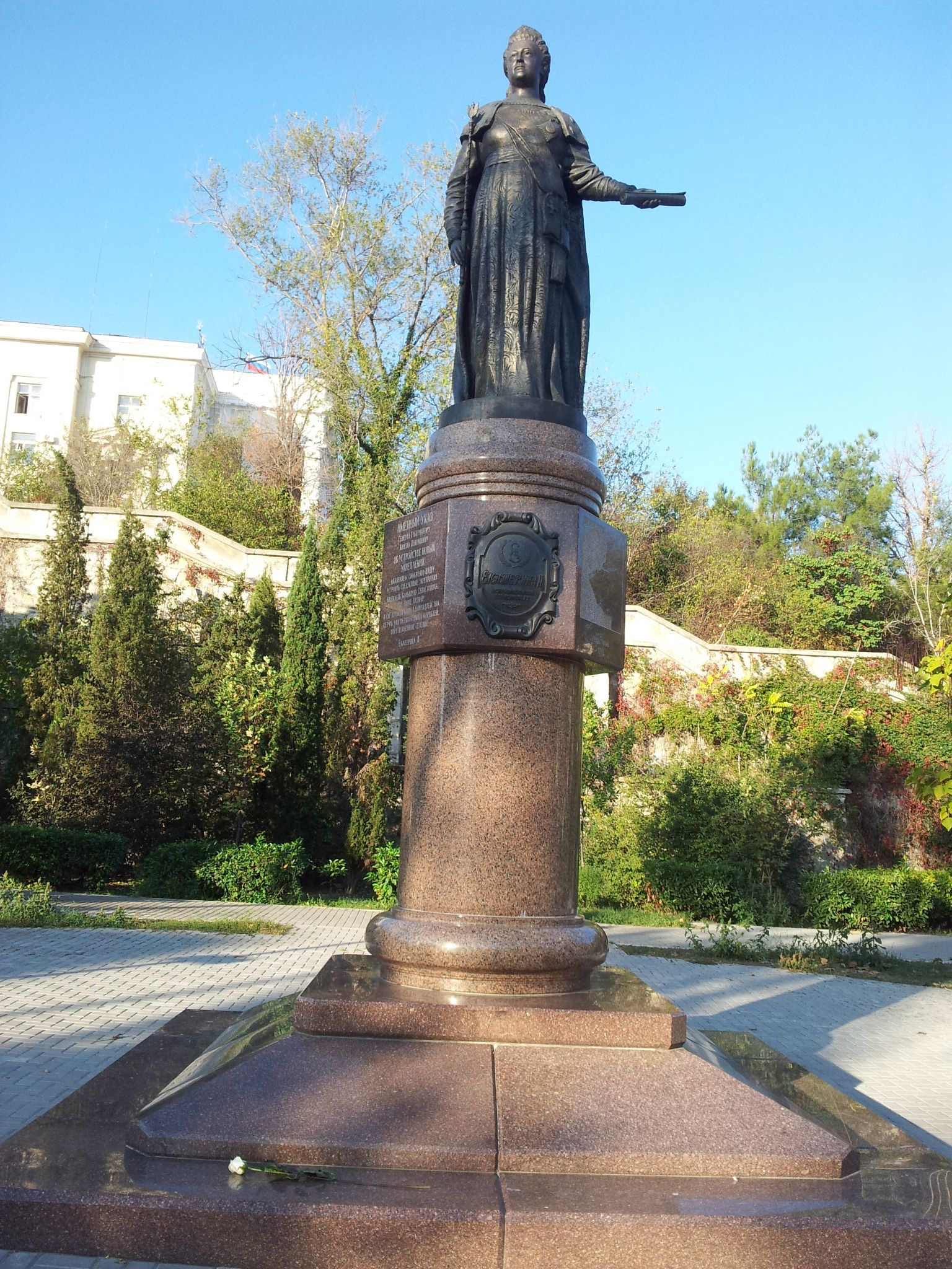 Carowa Rosji Katarzyna II, pomnik w Sewastopolu na Ukrainie